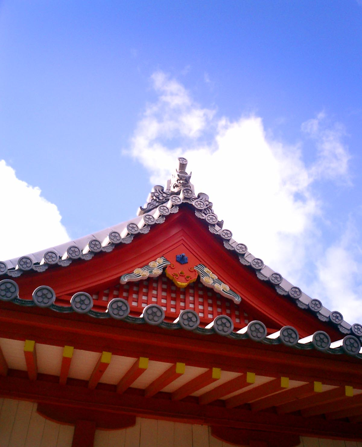 Awazu-tenman-jinja, Kakogawa, Hyogo prefecture, Japan